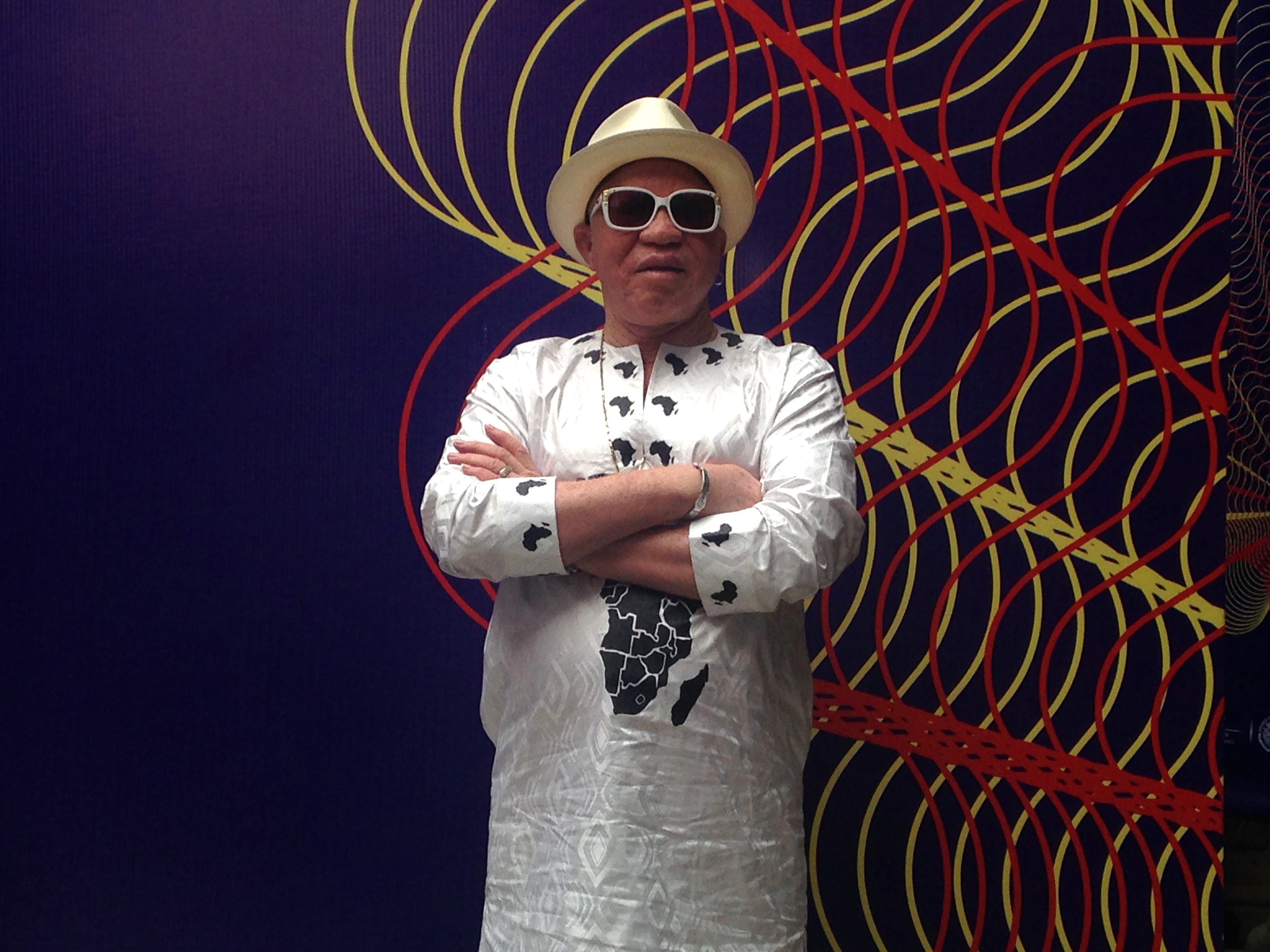 El compositor y músico maliense Salif Keïta en el Festival Internacional Cervantino.